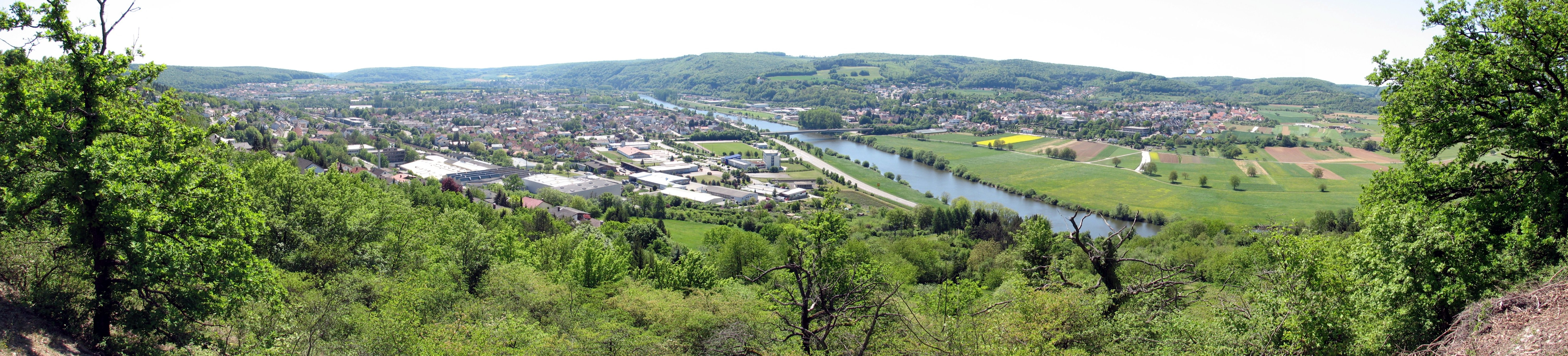 Elzmündungsraum (Mosbach-Neckarelz, Mosbach-Diedesheim und Obrigheim; Standort: Hamberg; Stitch mit Autostitch: [1]